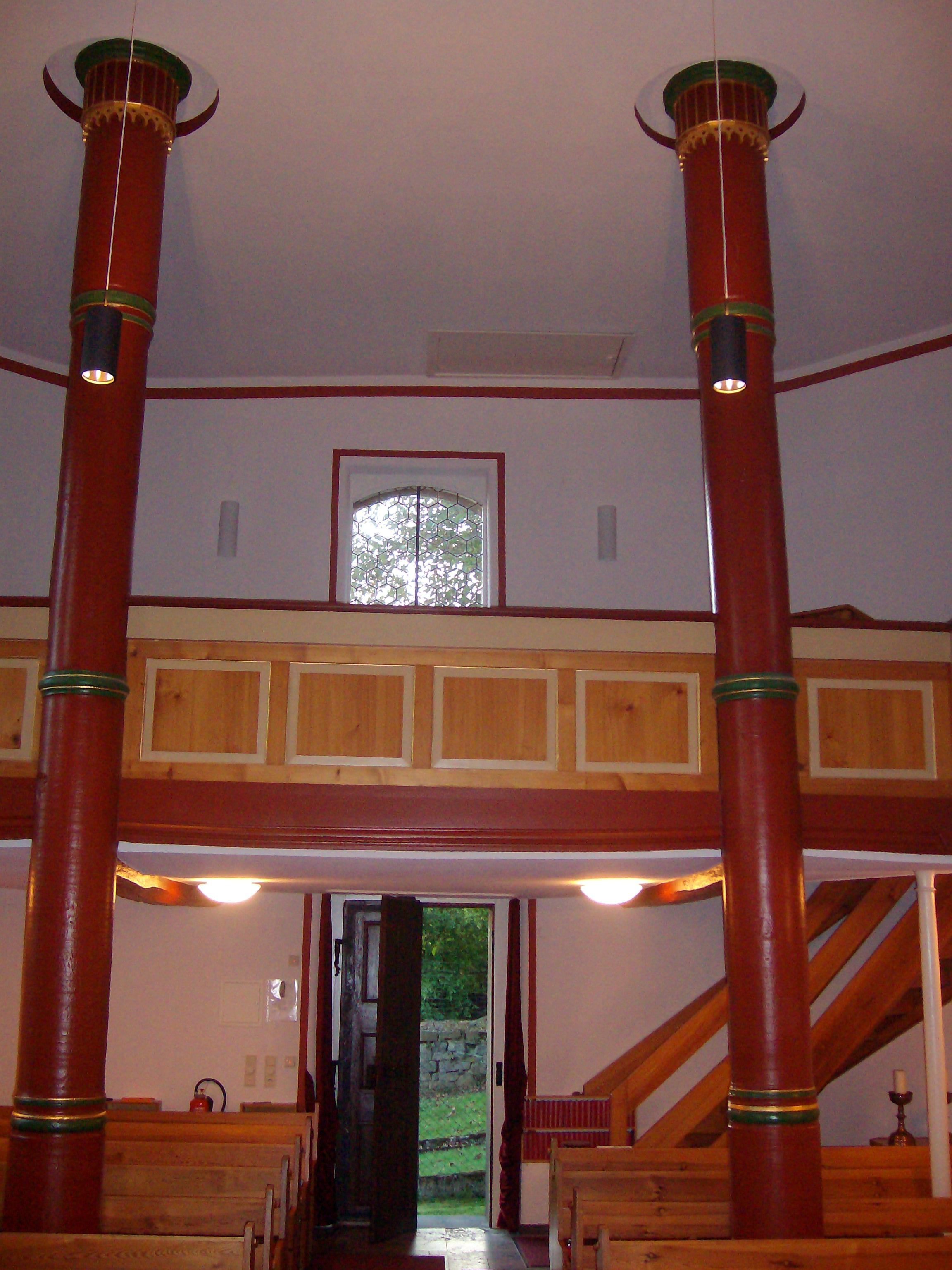 Westempore der Evangelischen Kirche Lauter, Laubach, Landkreis Gießen, Hessen, Deutschland